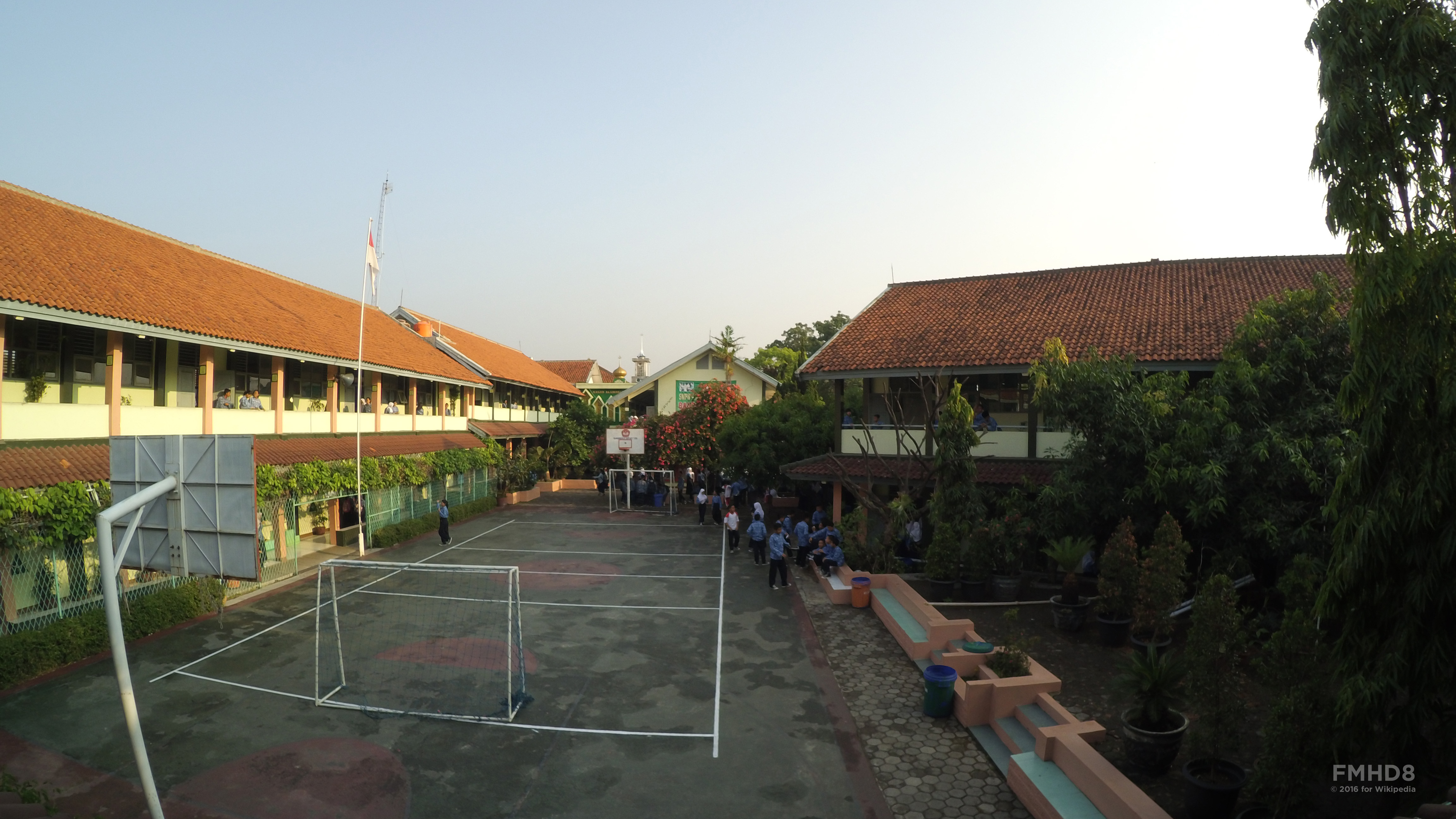 Lapangan multifungsi di SMPN 4 Bandung